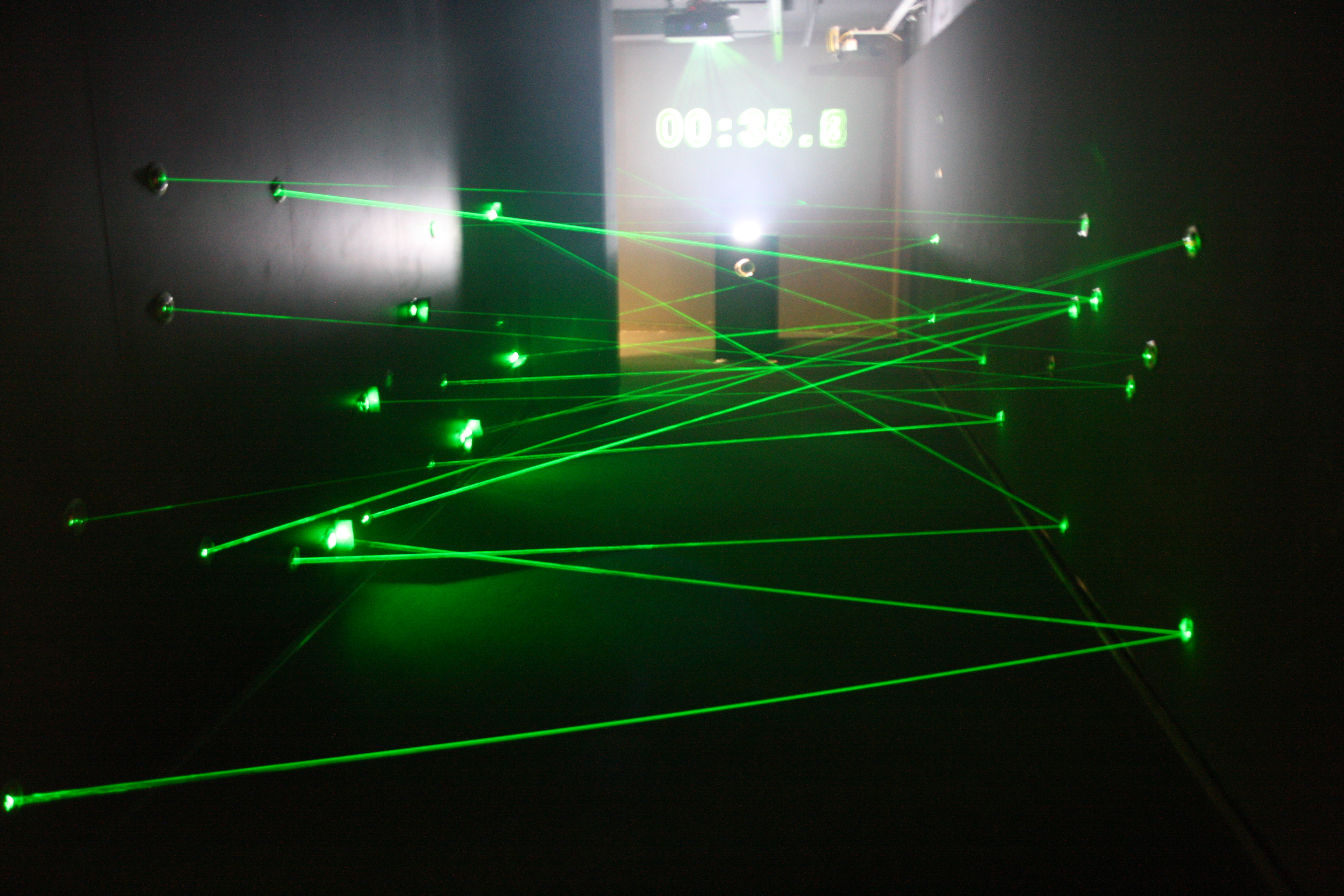 Laserparcours im Spy Museum Berlin